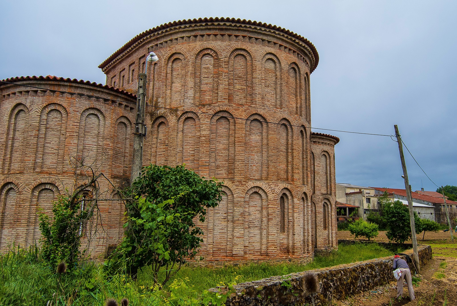 Pequeña aldea próxima a Bragança, los restos de su monasterio románico son una joya del patrimonio portugués